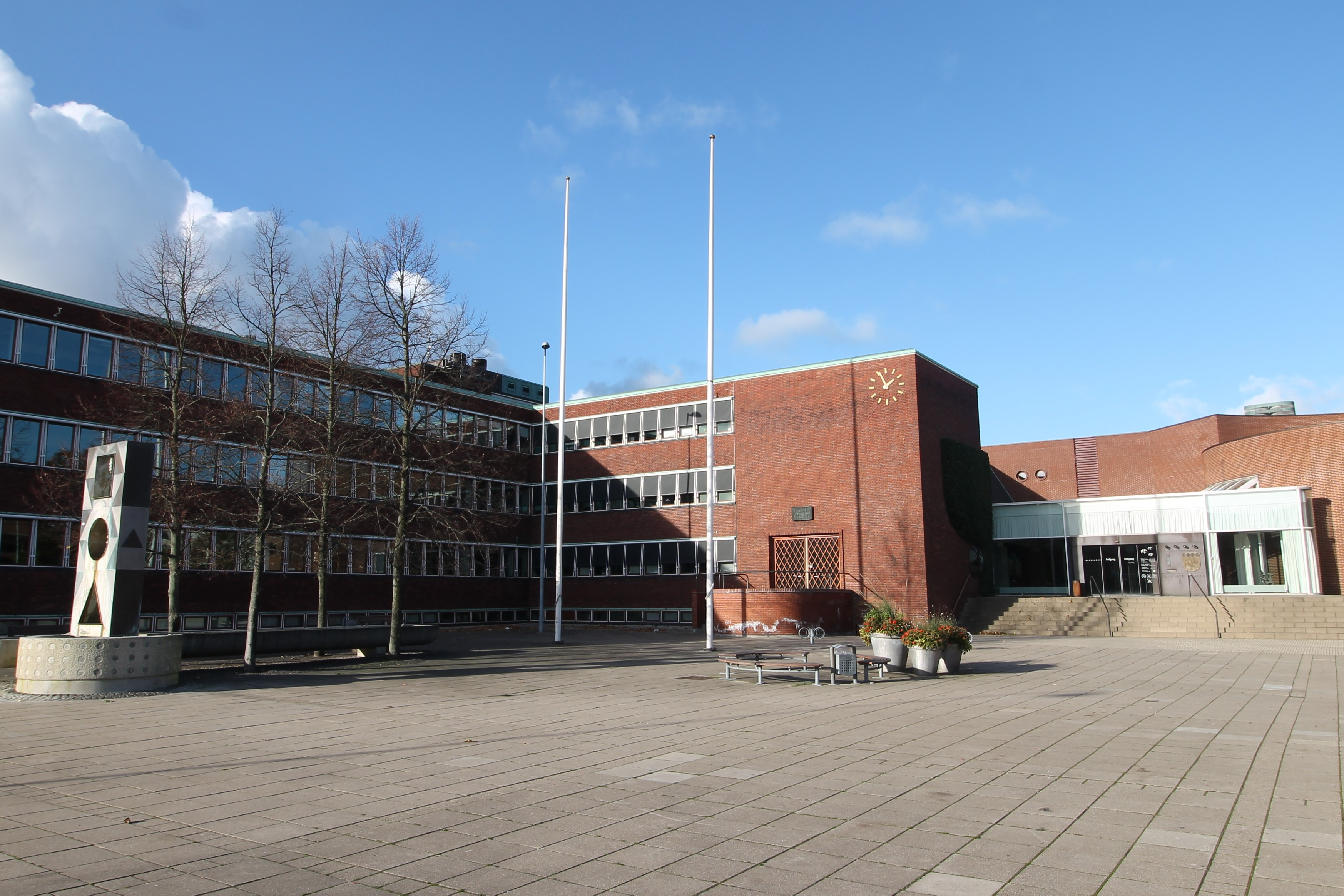 Gladsaxe Rådhus